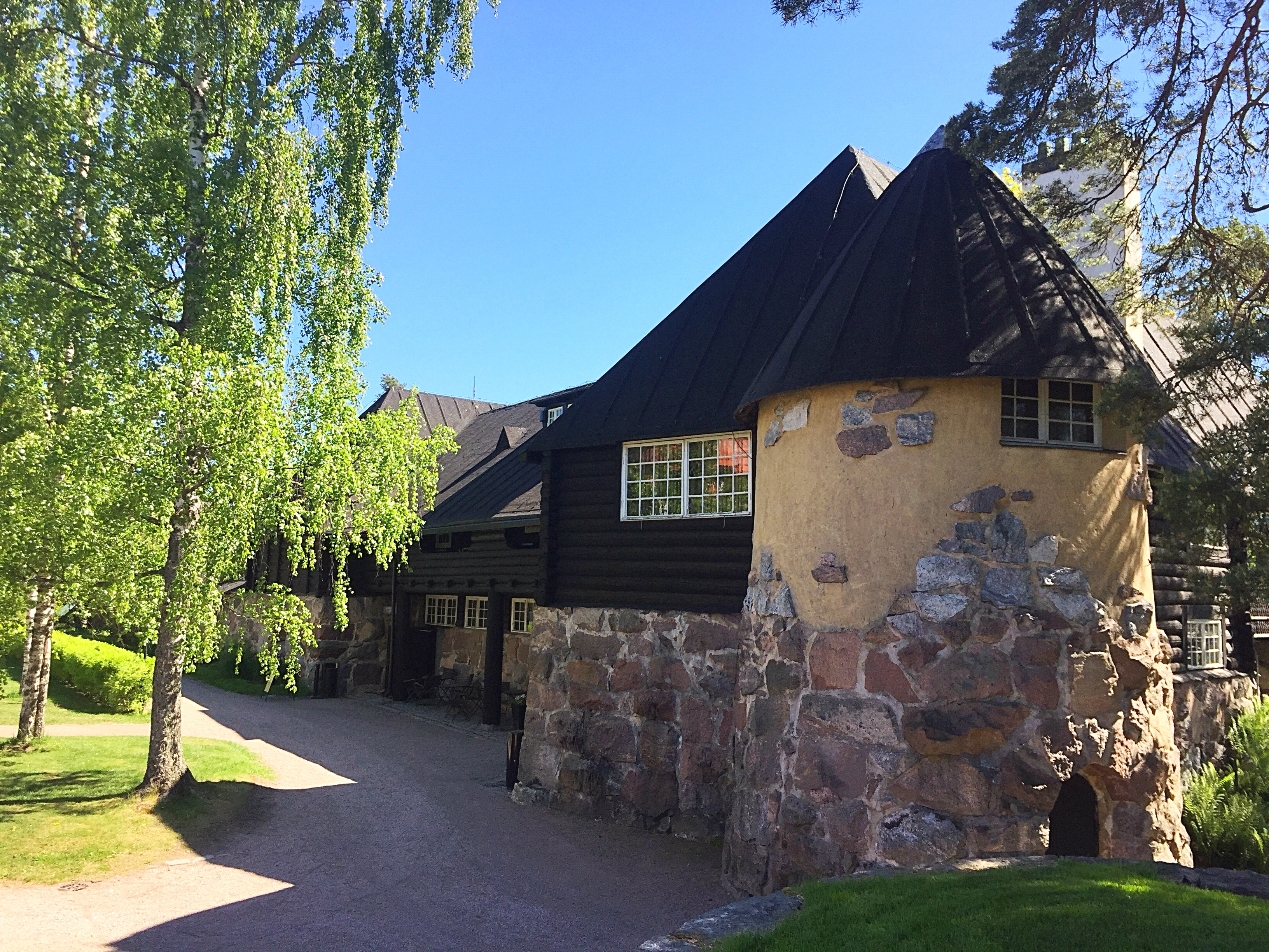 Hvitträsk; taiteilijakoti ja kulttuuriympäristö Kirkkonummella